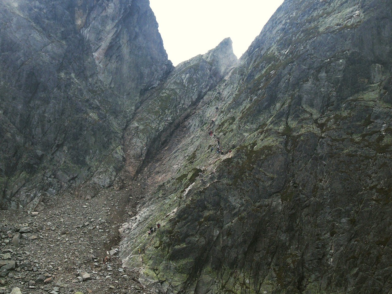 Przełęcz Czerwona Ławka w słowackich Tatrach Wysokich (od strony Doliny Małej Zimnej Wody)